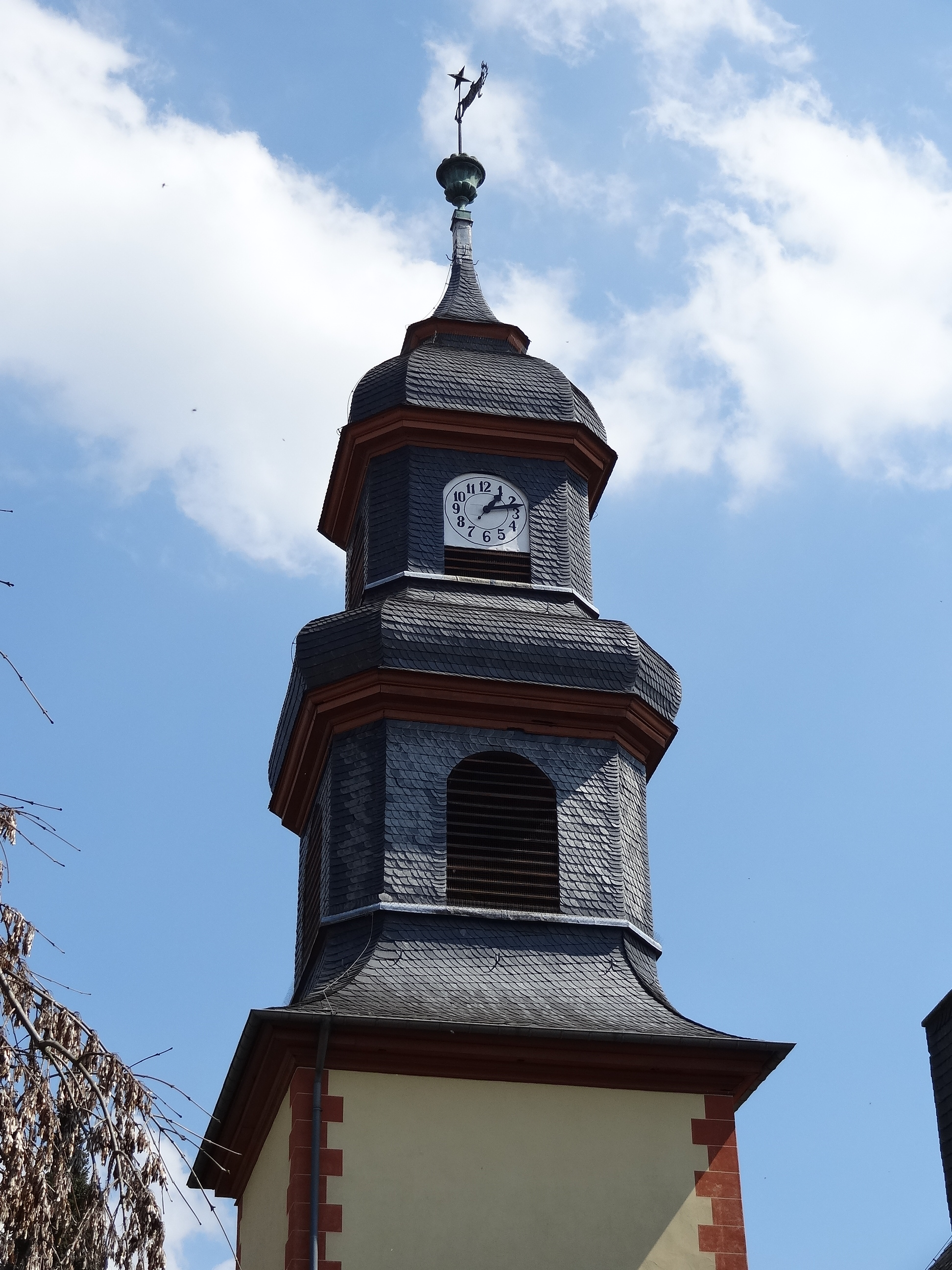 Evangelische Kirche Ober-Hörgern